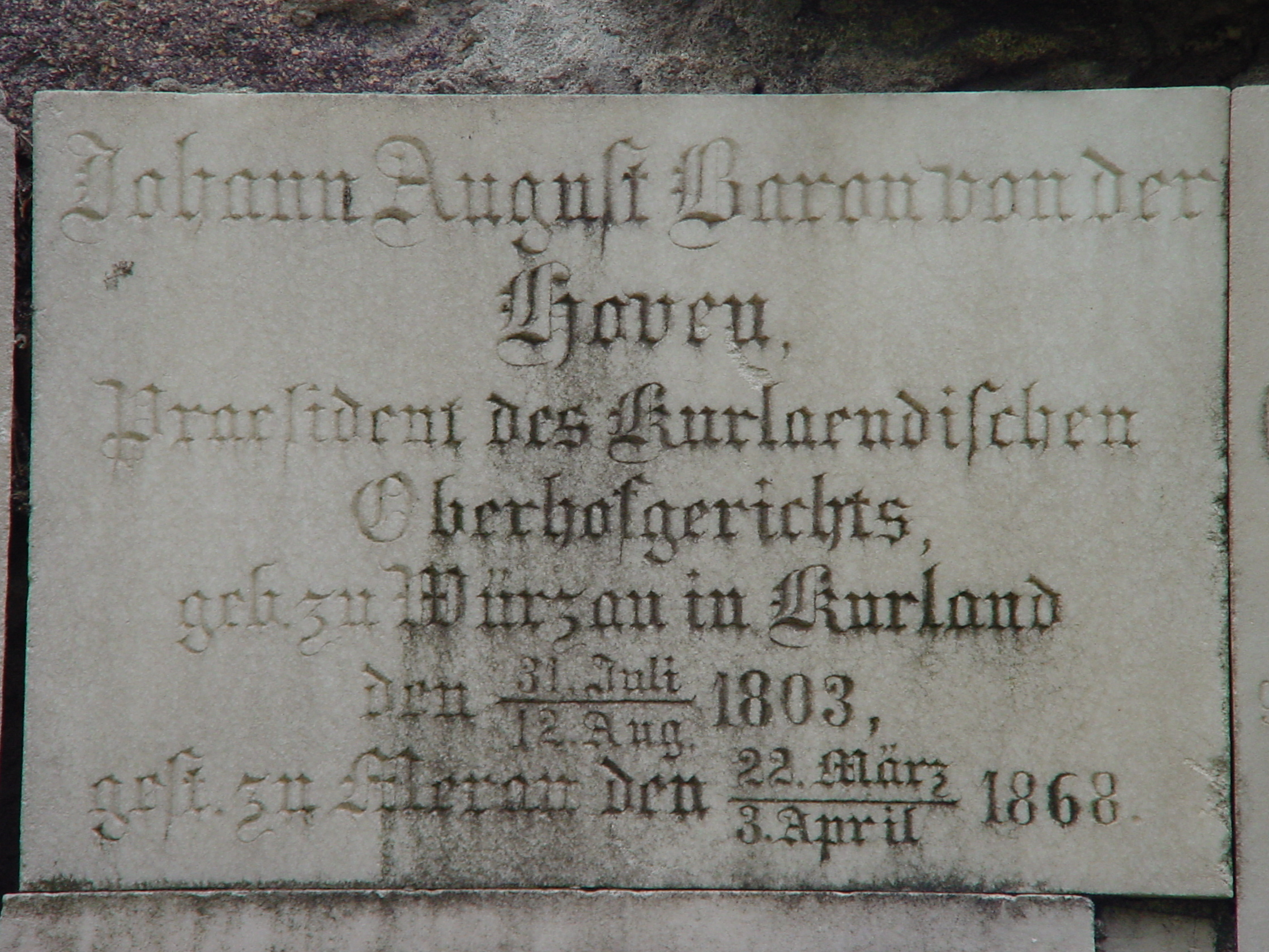 Grabtafel an der Friedhofsmauer des evangelischen Friedhofs in Meran